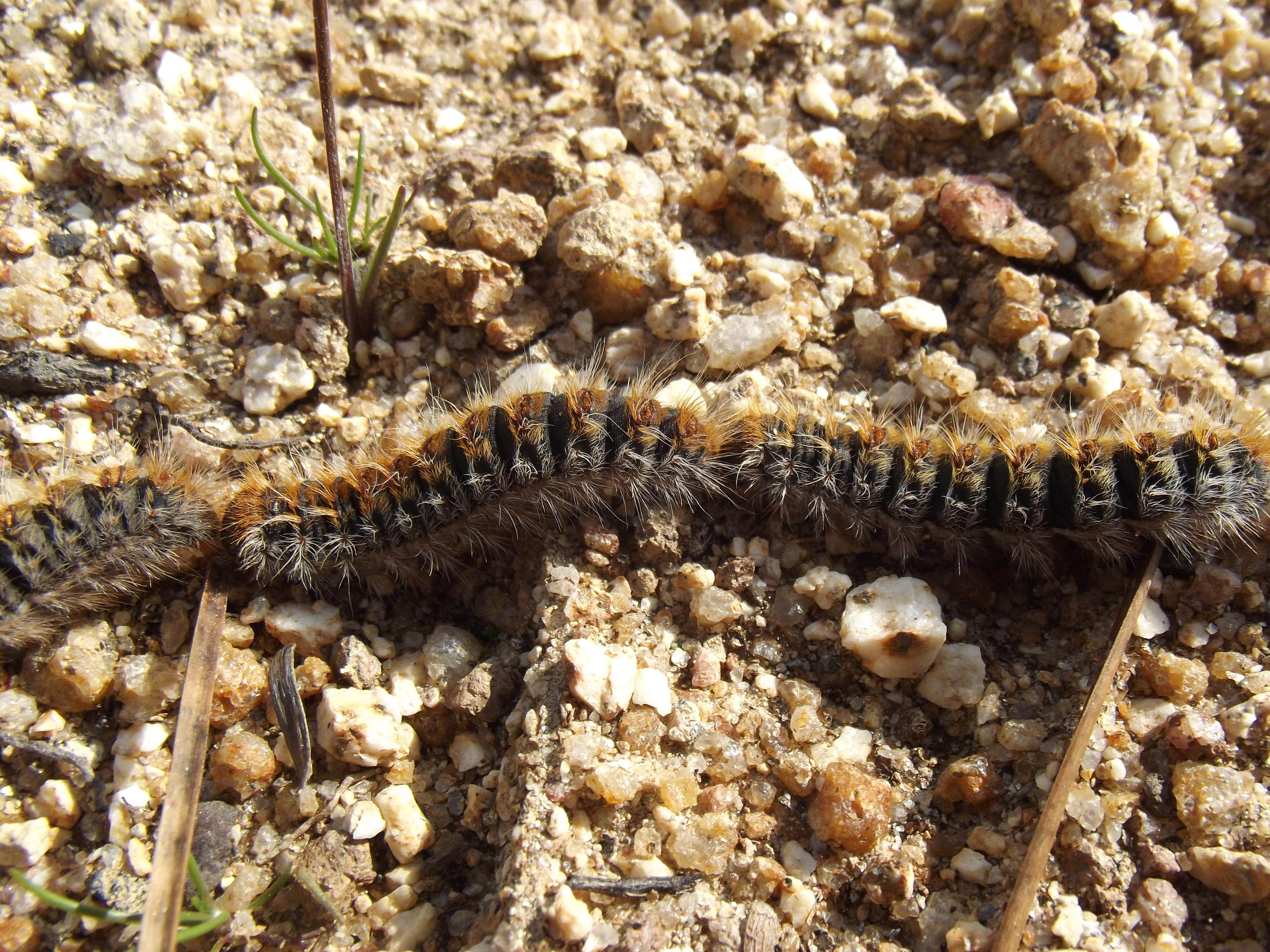 Orugas procesionarias del pino en los alrededores de La Parra, Castilla y León, España.